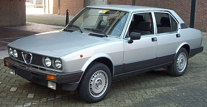 Alfetta sedan/saloon, late version